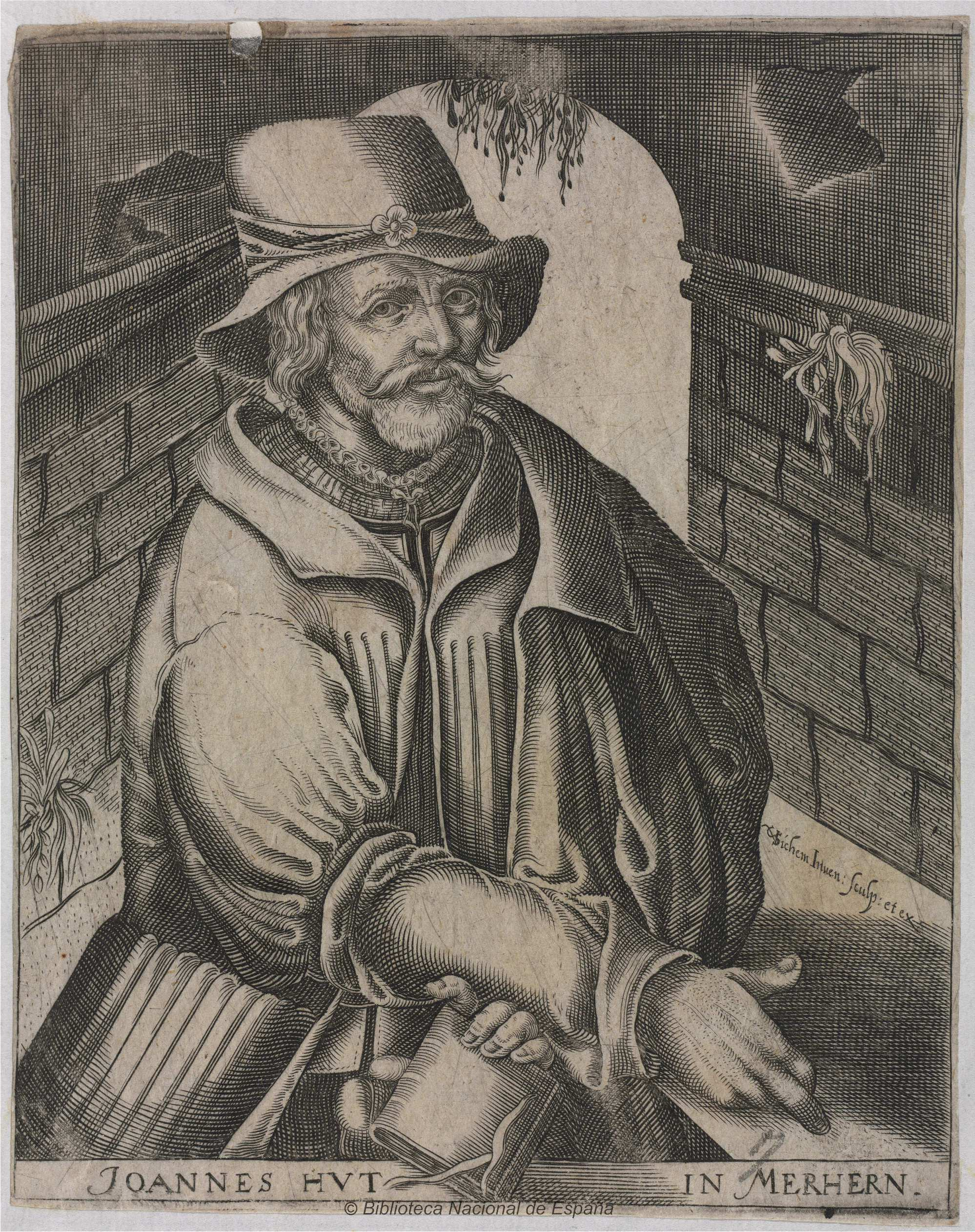 Hans Hut-Serie de personajes ilustres firmada por Christoffel van Sichem como inventor y editor. Biblioteca Nacional de España